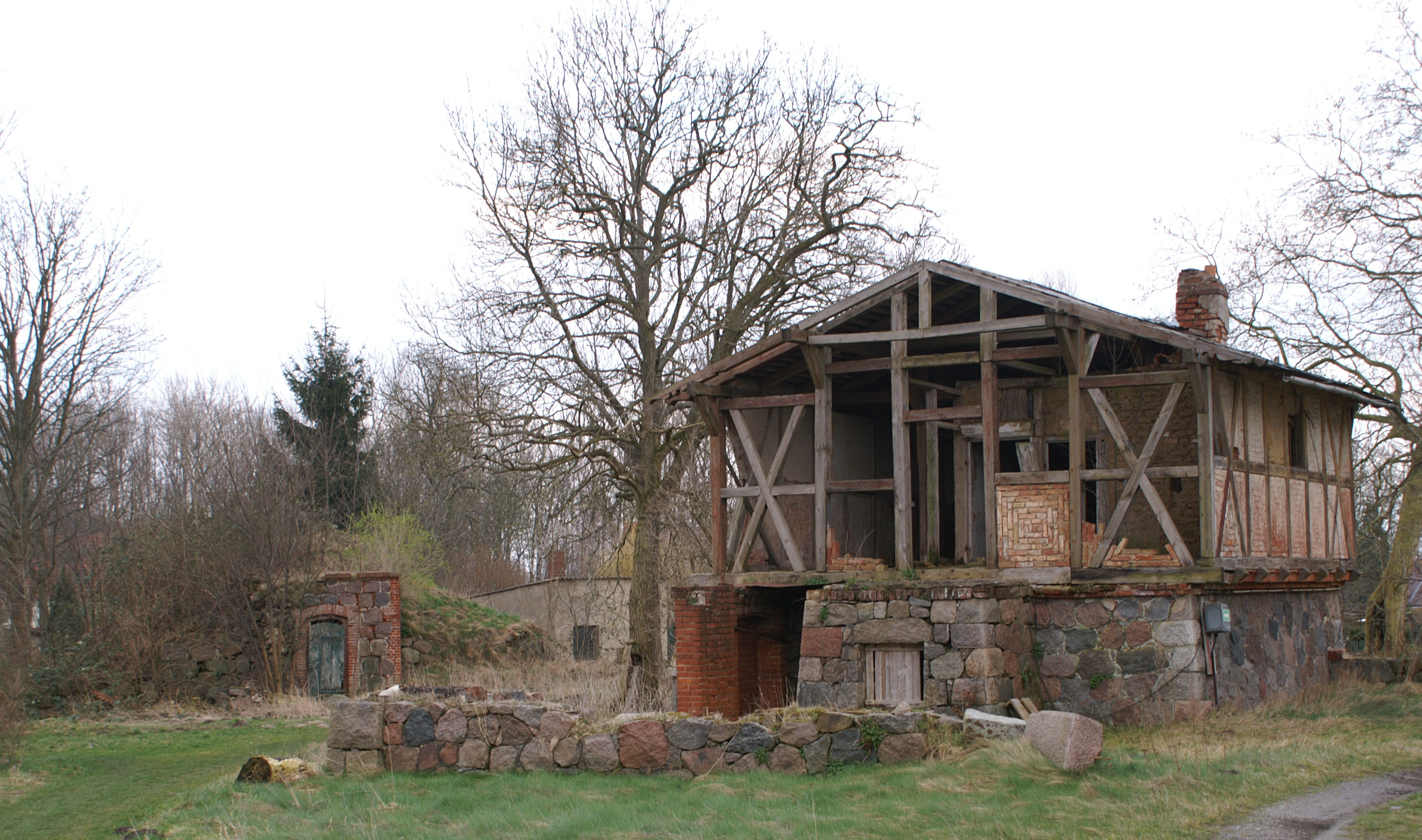 Gültz, Landkreis Demmin, Schloss Gültz, Eiskeller und ehemaliges Geflügelhaus